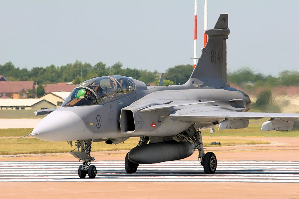 Gripen - RIAT 2006